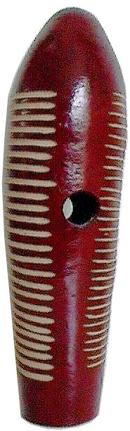 Guiro - origine wiki nl